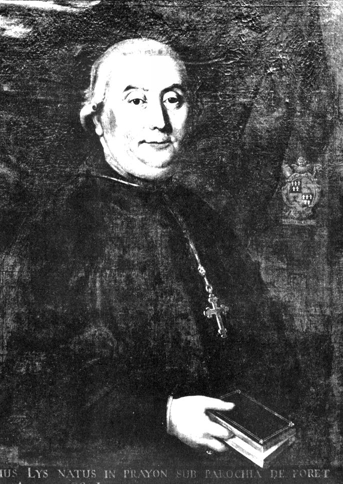 Reproduction du dernier abbé de l'abbaye de Saint-Maurent Liège (fin XVIIIème siècle).